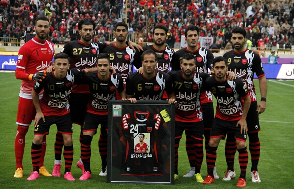 باشگاه فوتبال پرسپولیس تهران - دربی ۸۱ - ۸ آبان ۱۳۹۴